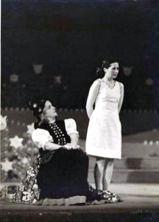 Babay József: Csodatükör. Nemzeti Színház. Bemutató: 1937/06/04. Rendező: Németh Antal. Szereplők: Mikan néni: Berky Lili, Katalin: Somogyi Erzsi.